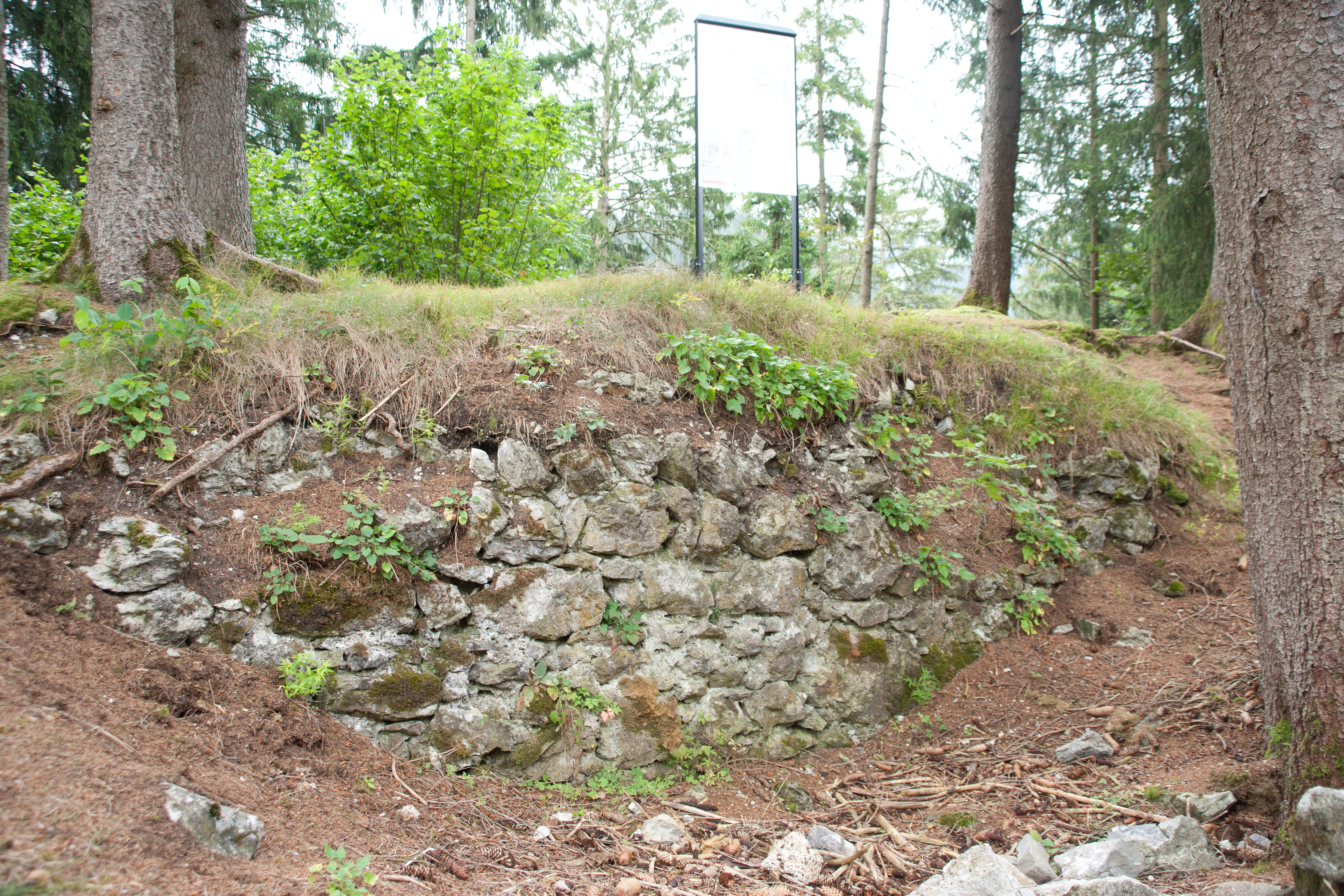 Ruines du château Oberer Mannenberg à Zweisimmen, canton de Berne.